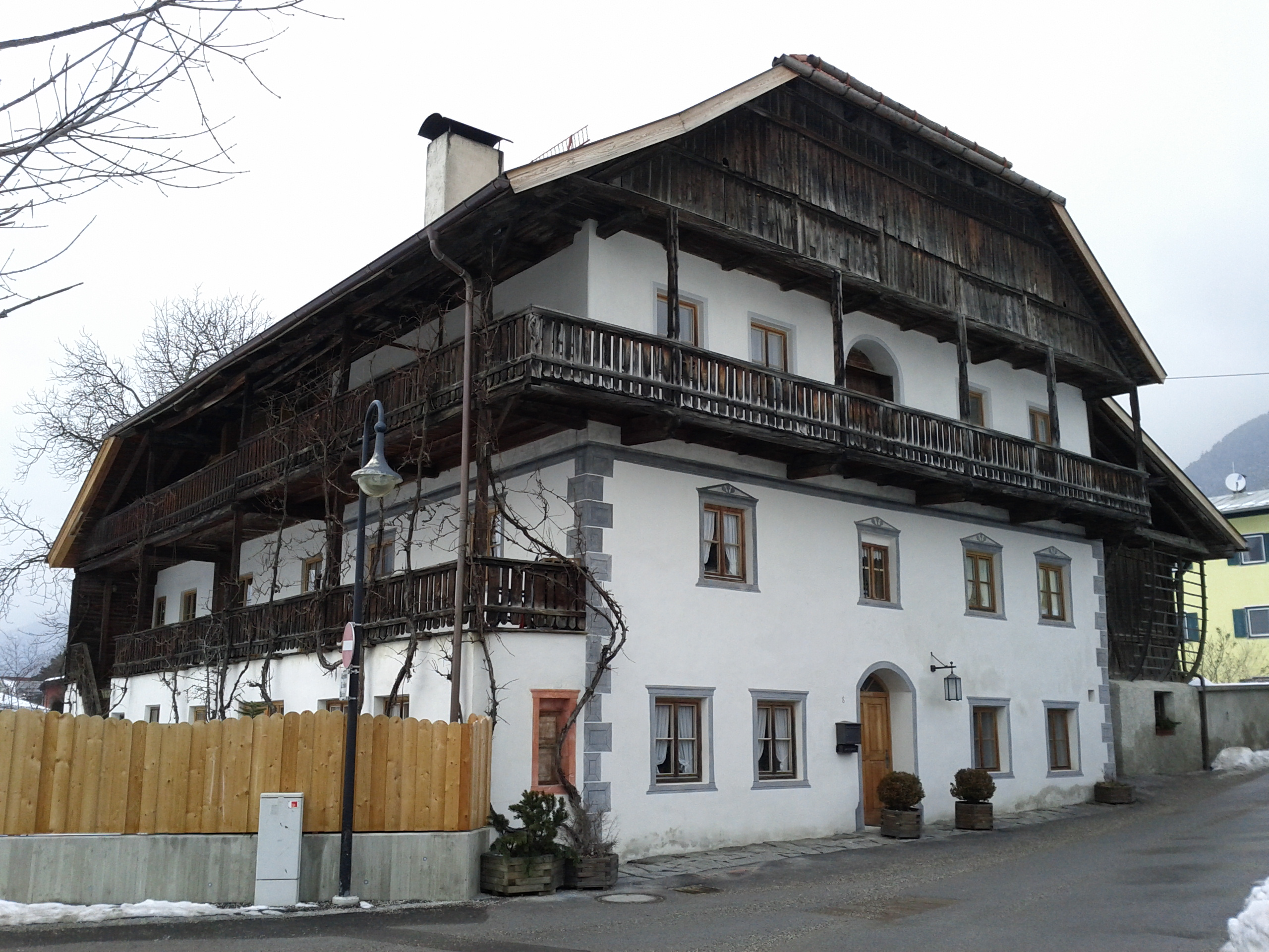 Wohnhaus, sog. Garberhaus - Schulgasse 8, Zirl